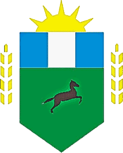 Escudo del municipio de Hipólito Yrigoyen, provincia de Buenos Aires.